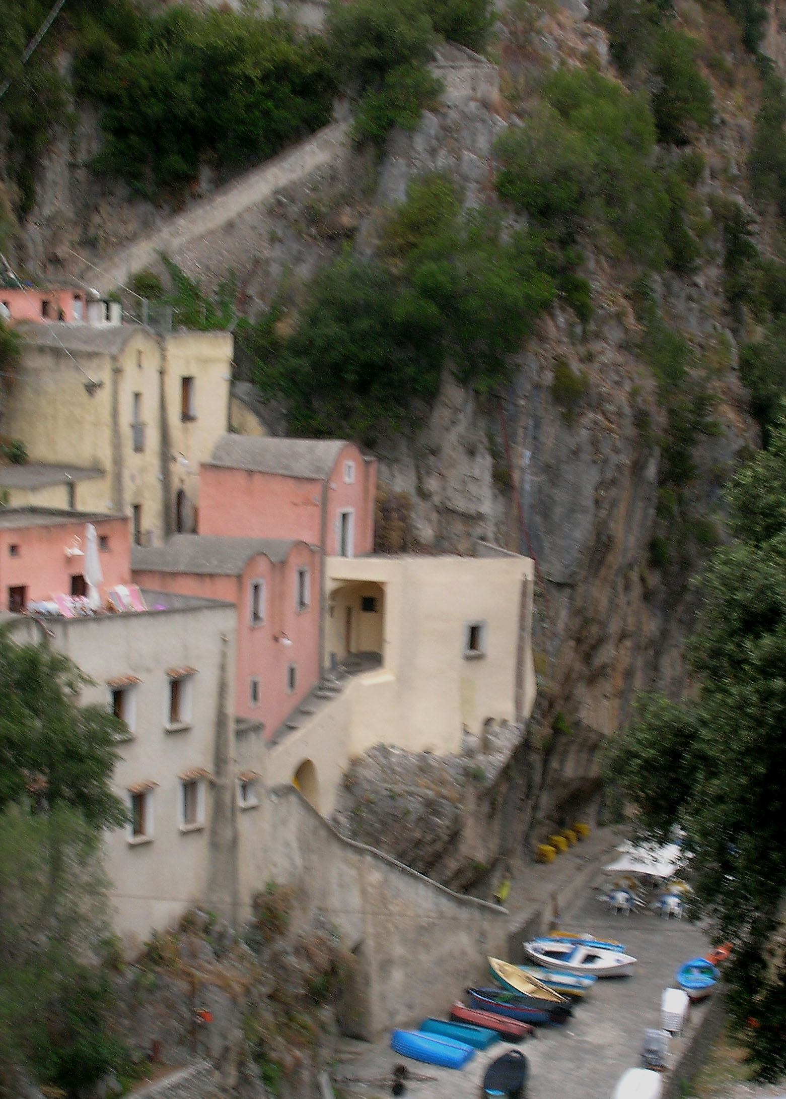 Idyllescht Bild un der Amalfitana Küstestrooss geknipst.